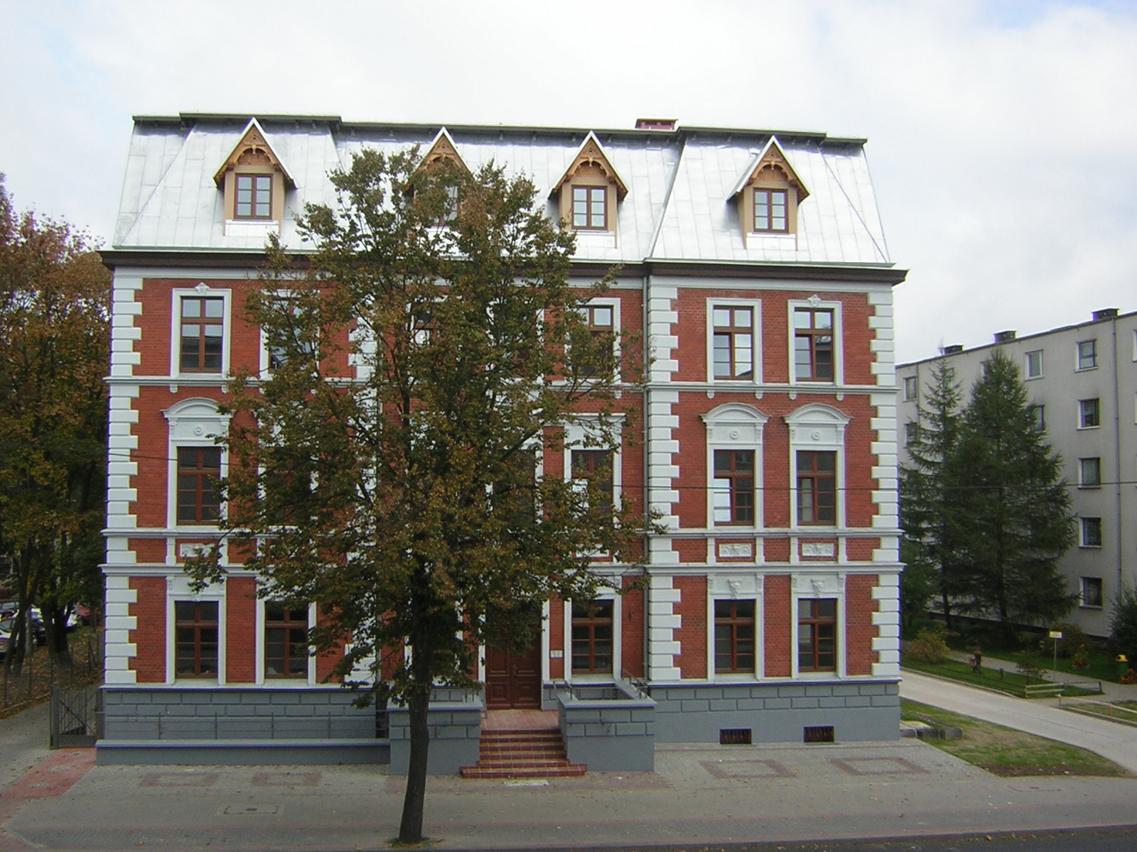 Budynek po komendzie powiatowej policji w Iławie zaadaptowany na cele mieszkalne.